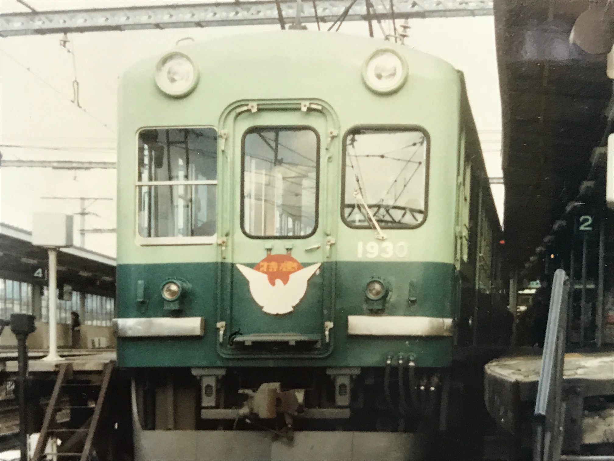 1900系代用特急